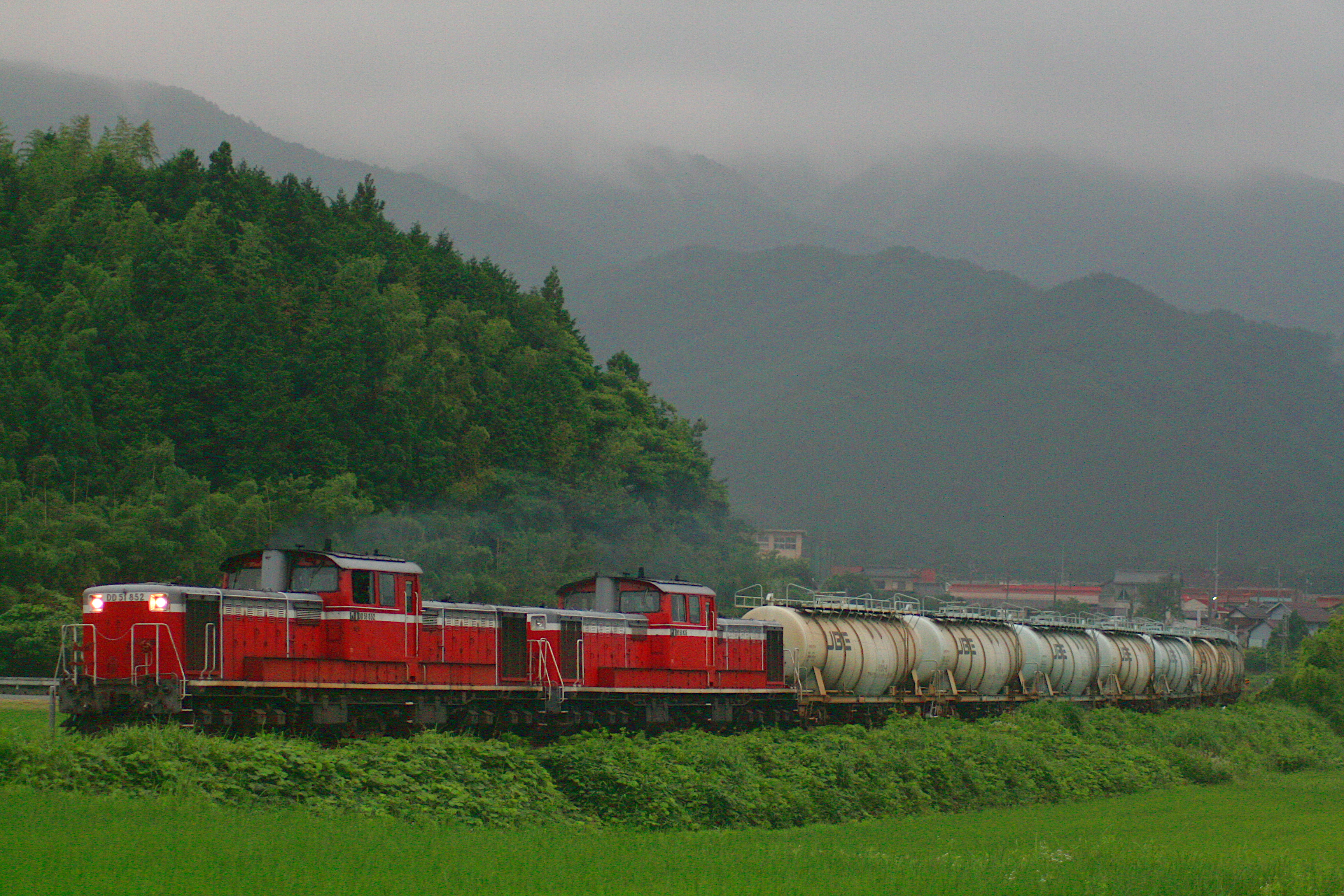 山口線を走行するJR貨物DD51形ディーゼル機関車852号機と835号機（重連）とタキ1100形（貨物列車）